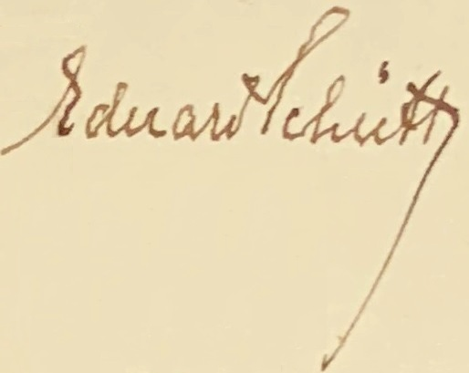 Firma de Eduard Schütt, 5 de mayo de 1.931